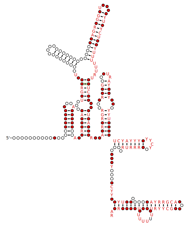 R-Scape Predicted Secondary Structure of SQ1002 sRNA